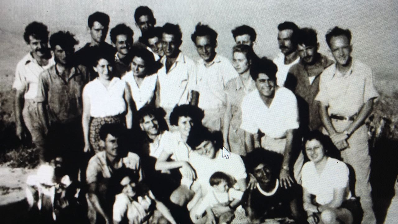 אנוצה רוזן וציפי רחמוט, גרעין משגב עם בשנות ה50